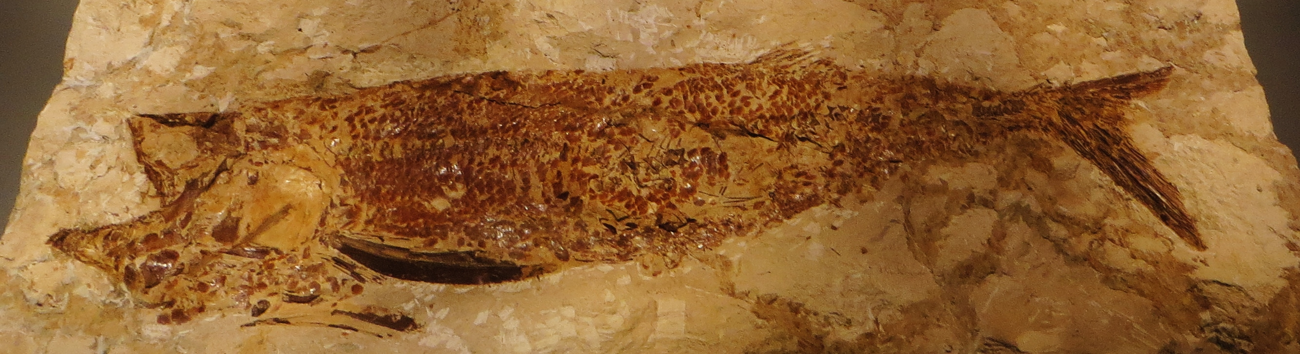 Fossil of Platinx- Museo dei Fossili di Bolca